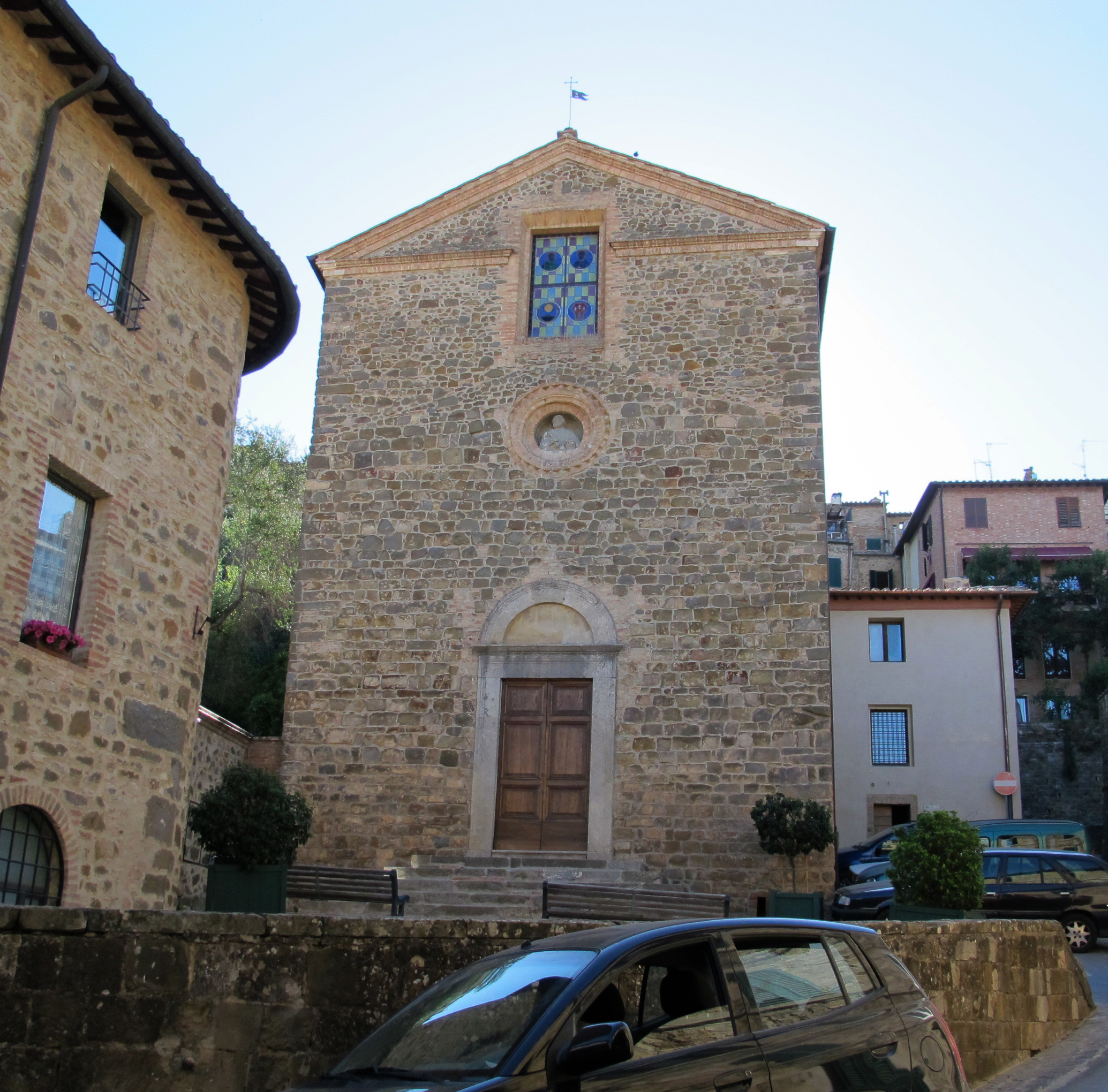 Montalcino, san pietro